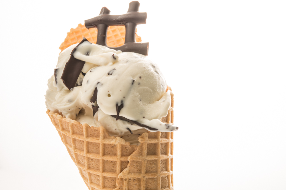 Cono di La Stracciatella il gelato di Bergamo